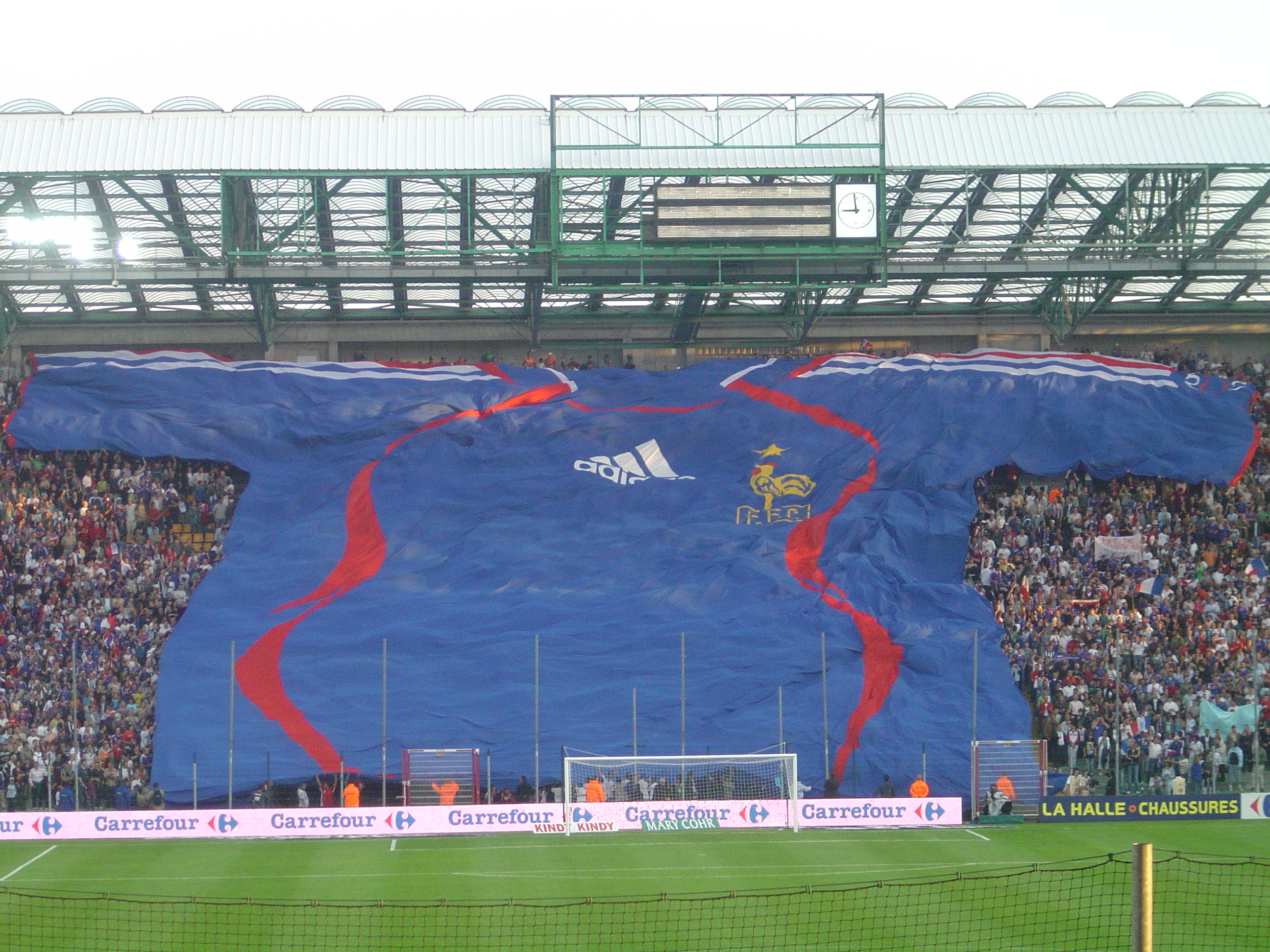 Photo du tifo de football du Stade Geoffroy Guichard réalisé lors de la saison 2005-2006 pour la venue des bleus au chaudron le 7 juin 2006 contre la Chine (3-1). On peut ainsi voir le maillot des bleus étendu sur le Kop Sud (Tribune Jean Snella). Cette photo a été prise par Mickaël Roure alias Altrensa pour Wikipédia le 7 juin 2006. Elle ne saurait être utilisée sans la mention de son auteur. D'avance merci. Licensing Catégorie:Image de l'ASSE